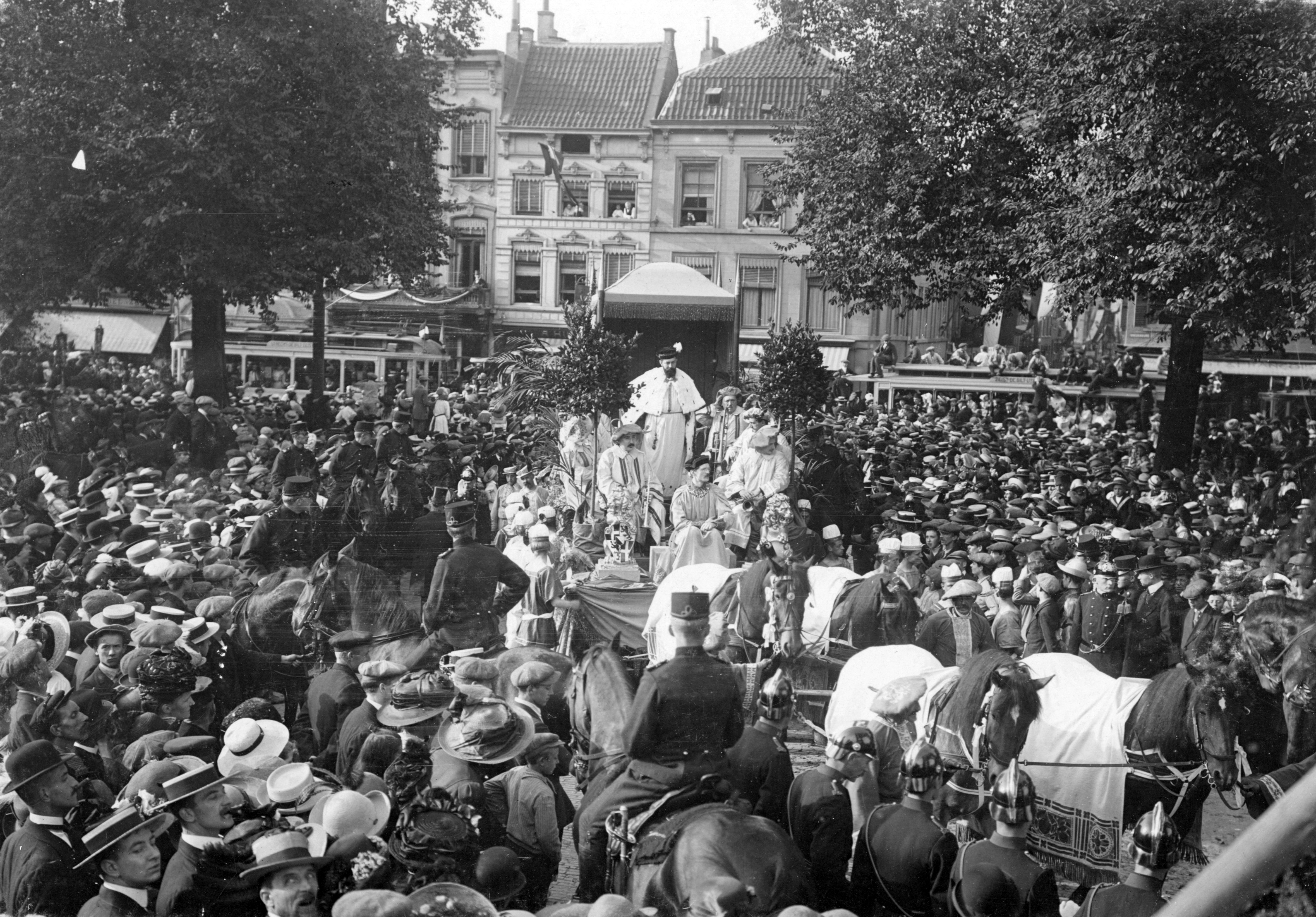 Afbeelding van de praalwagen van de vierde groep in de optocht ter gelegenheid van het Feest van Kleur en Klank, de feestelijkheden rond de herdenking van het herstel van de Nederlandse onafhankelijkheid in 1813, voorstellende De eendracht van het land, op het Vredenburg te Utrecht. N.B. De praalwagen wordt getrokken door 8 paarden en draagt de solist Jac.Ph. Caro en twaalf bazuinblazers, leden van het Utrechts Stedelijk Orkest en wordt begeleid door een escorte van 48 ruiters in nationale kleuren.